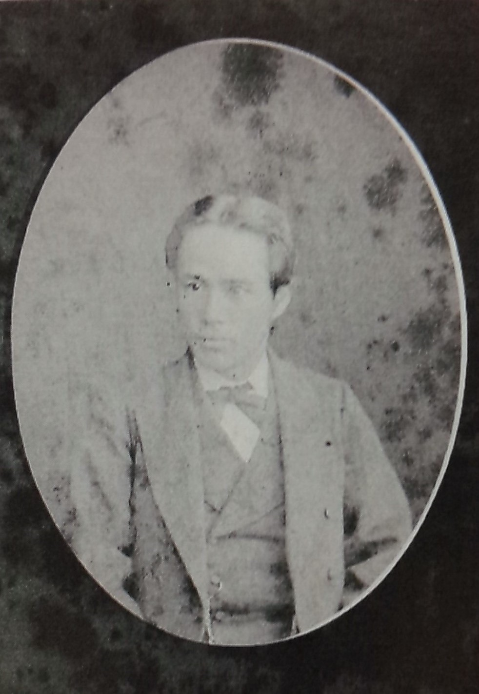 池田徳潤(喜延)の肖像写真。